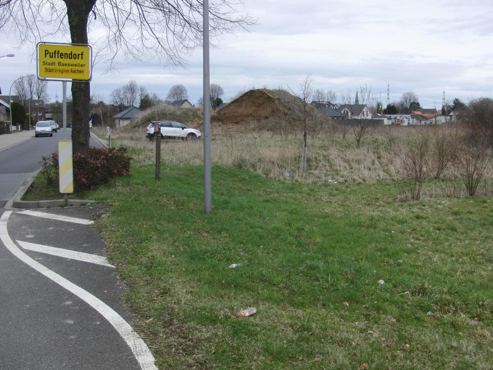 Ehemaliges Bahnhofsgelände Puffendorf der Jülicher Kreisbahn im Jahr 2018